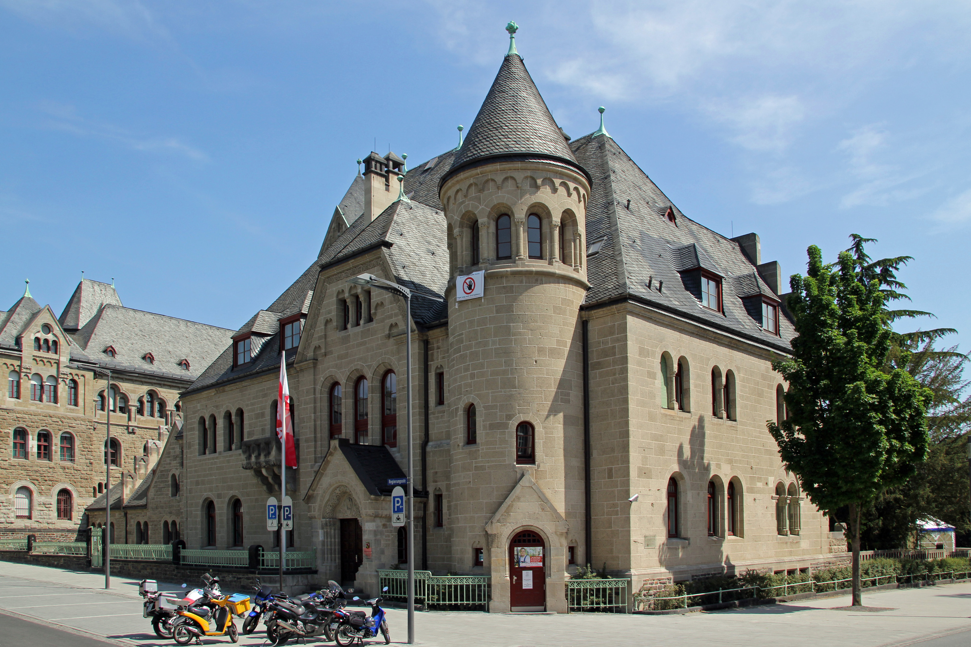 Koblenz im Buga-Jahr 2011 - Die Dienstvilla des Regierungspräsidenten neben dem Preußischen Regierungsgebäude, heute Sitz des Oberlandesgerichts Koblenz